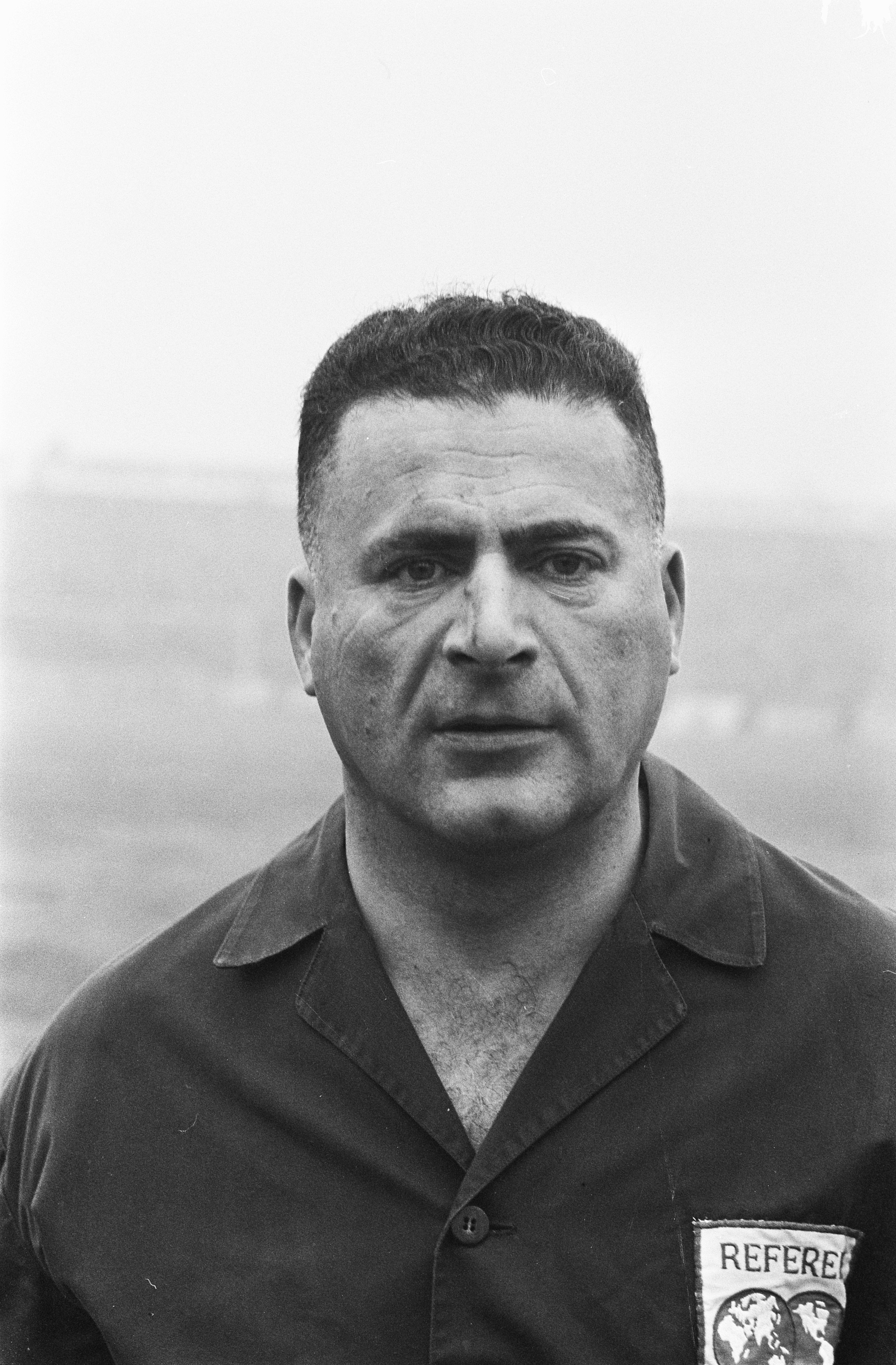 Collectie / Archief : Fotocollectie Anefo Reportage / Serie : [ onbekend ] Beschrijving : Sparta tegen Blauw-Wit 2-2, scheidrechter Leo Horn Datum : 5 januari 1964 Locatie : Rotterdam, Zuid-Holland Trefwoorden : portretten, scheidsrechters, sport, voetbal Persoonsnaam : Horn Leo Fotograaf : Walta, Winfried / Anefo Auteursrechthebbende : Nationaal Archief Materiaalsoort : Negatief (zwart/wit) Nummer archiefinventaris : bekijk toegang 2.24.01.05 Bestanddeelnummer : 915-9153